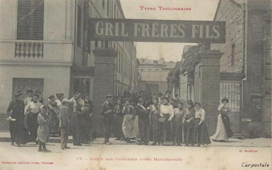 Une des cartes postales représentant la sortie des ouvrières de l'usine Gril